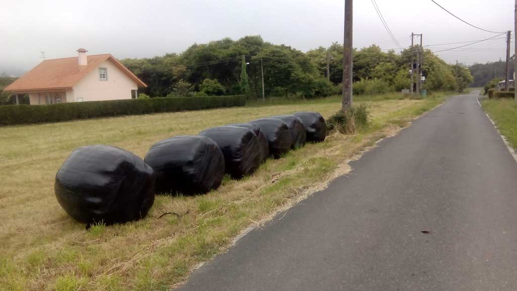 Vista do Campo das Ratas, Trasancos.